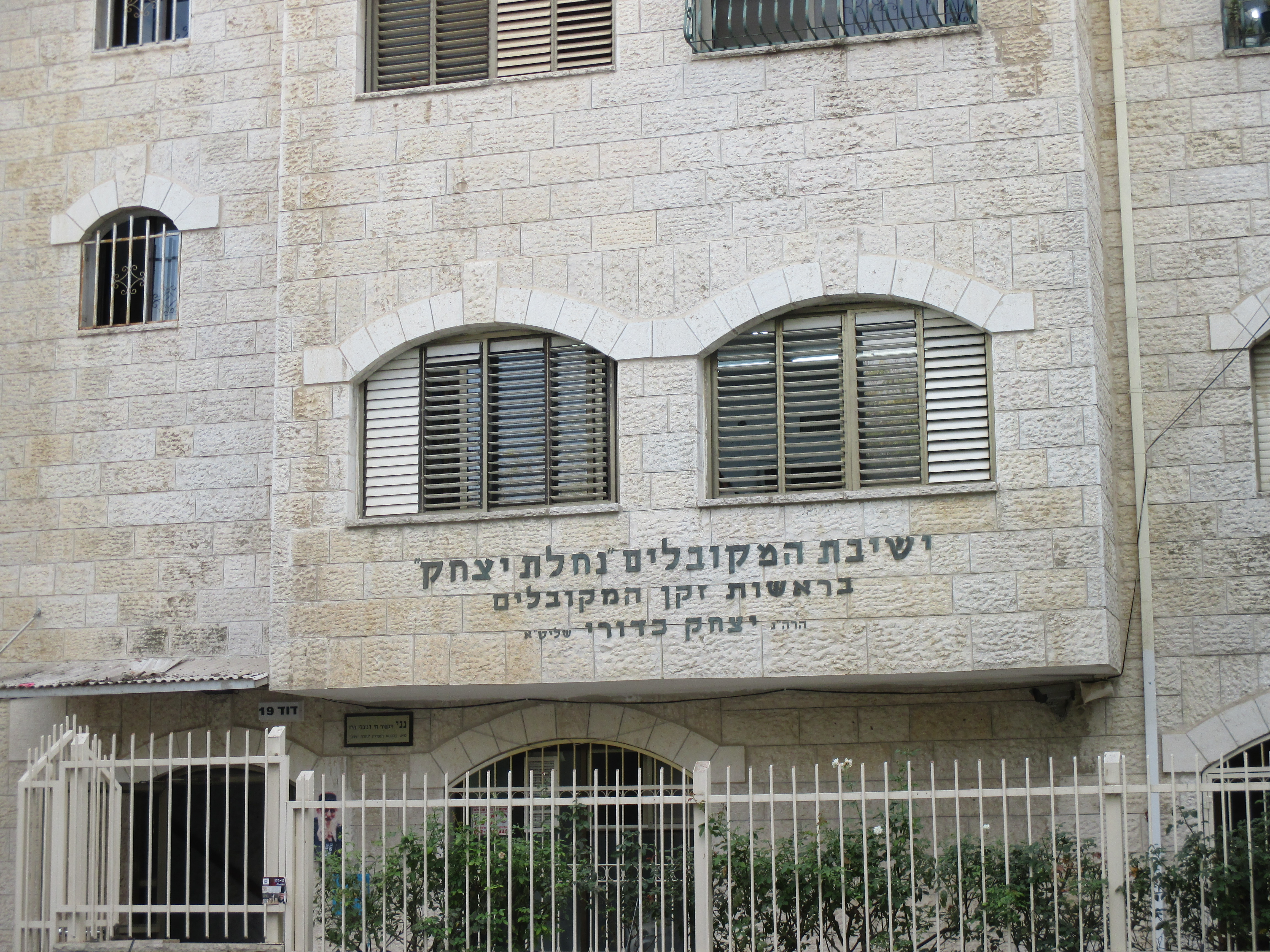 ישיבת נחלת יצחק בירושלים